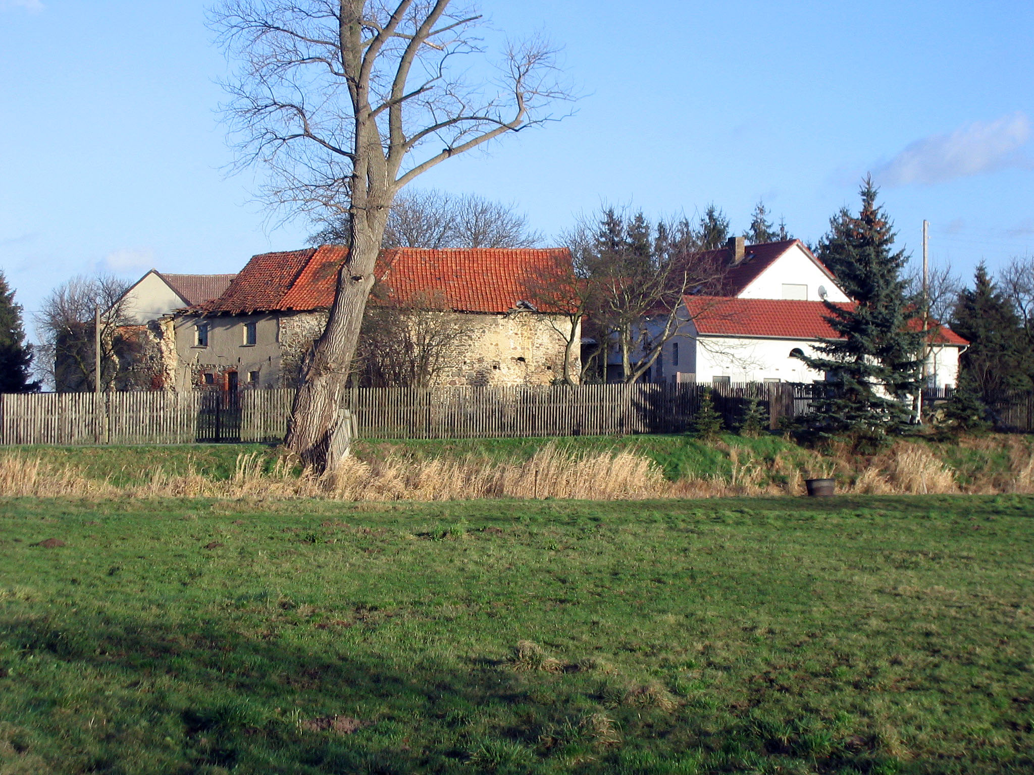 Ehemalige Burg Calvörde, Bild aufgenommen am 14.01.2007 durch Geisterbob